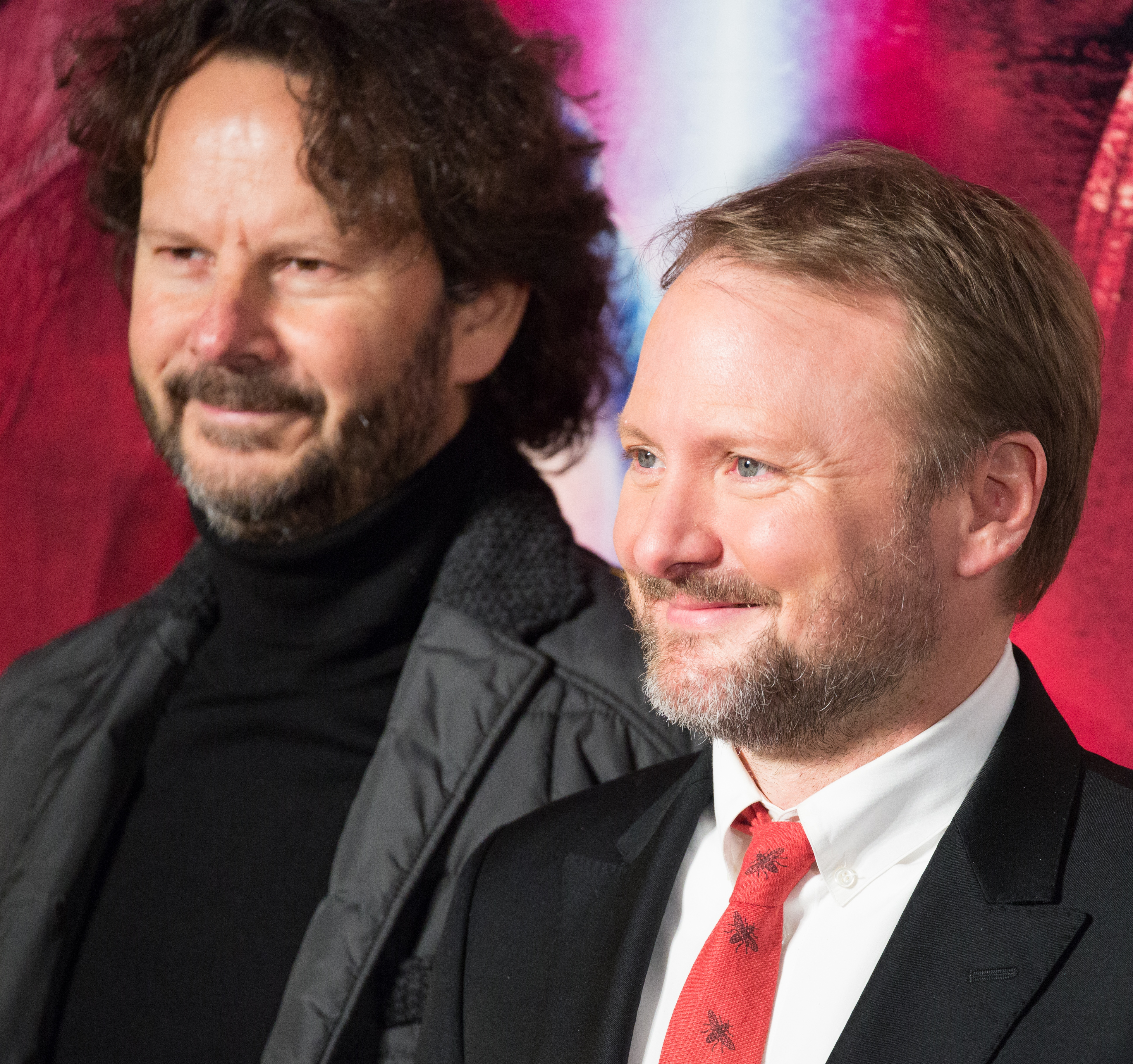 スター・ウォーズ/最後のジェダイ ジャパン・プレミア レッドカーペット ラム・バーグマン ライアン・ジョンソン マーク・ハミル